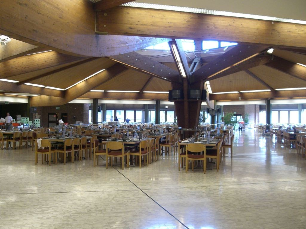 德国耶和华见证人伯特利餐厅